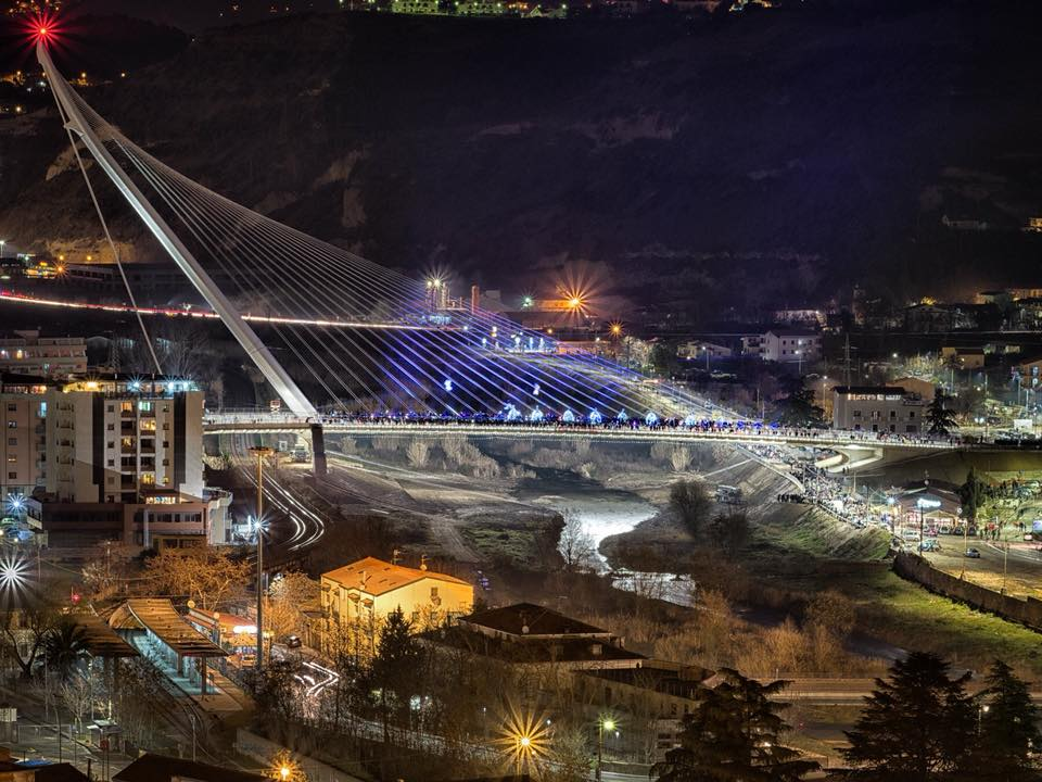 Ponte di San Francesco da Paola visto dal centro storico a Cosenza.